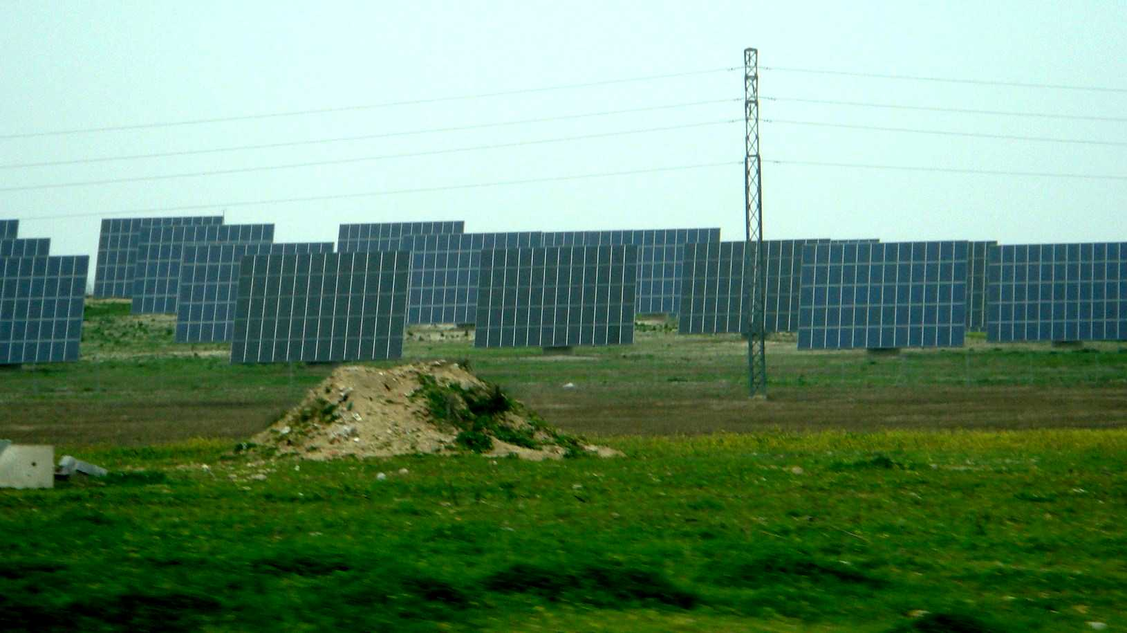 Planta de energía solar fotovoltaica en Sanlúcar de Barrameda (Provincia de Cádiz, España).